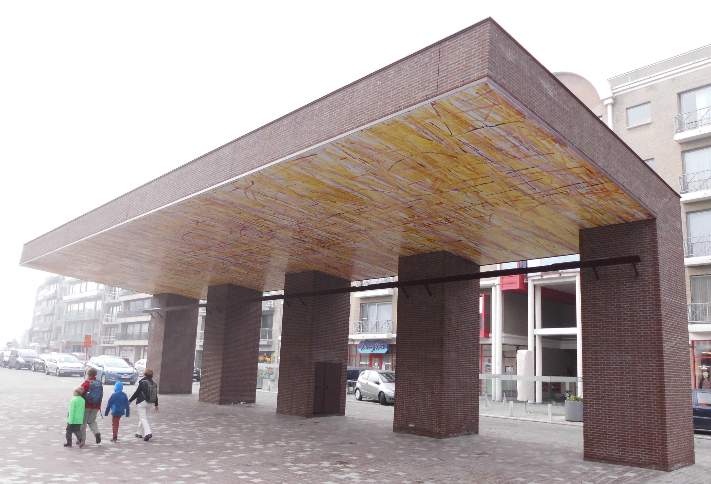 Deze luifel markeert de plaats van de oudste stadshalle in Deinze - Markt - Deinze - Oost-Vlaanderen - België